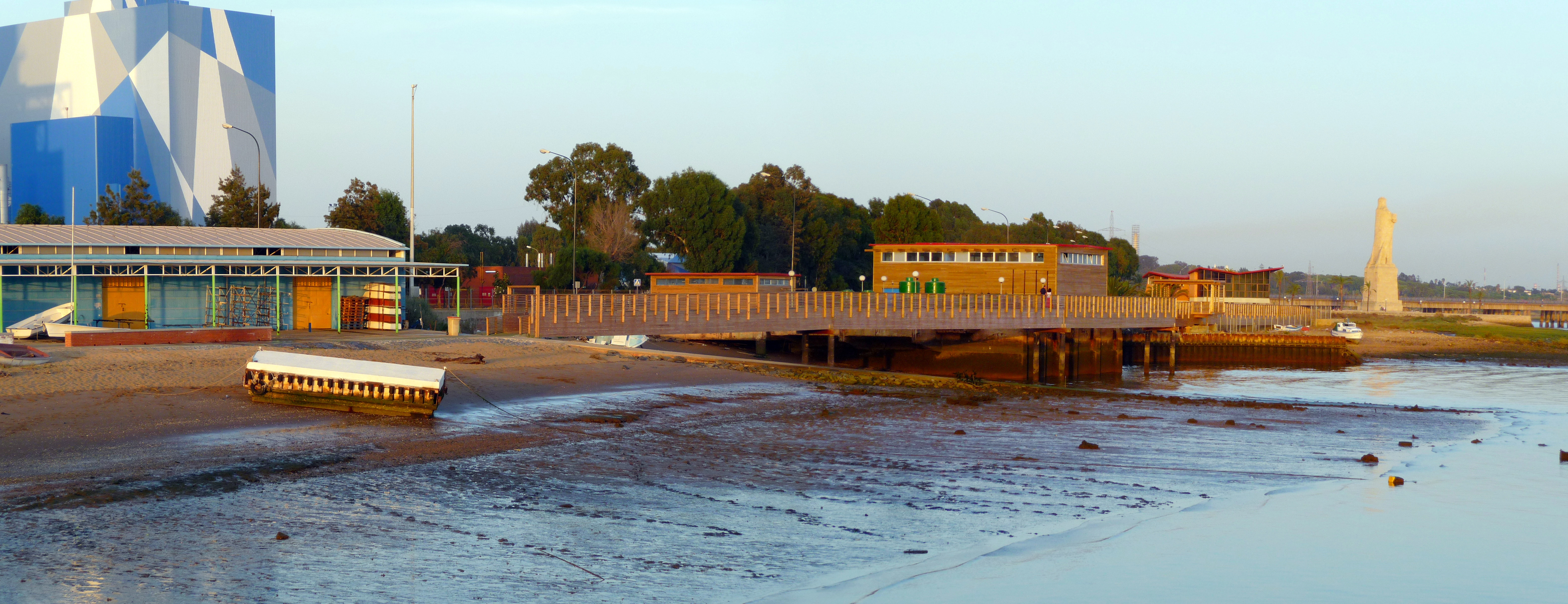 Panorámica de la Ría de Huelva (España) en la que se ve la Central Térmica de la Compañía ENDESA y el Monumento a la Fe Descubridora.